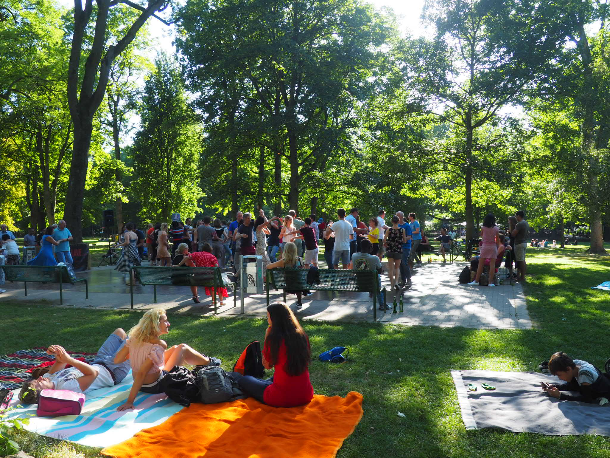 Westpark Kreuzviertel Dortmund